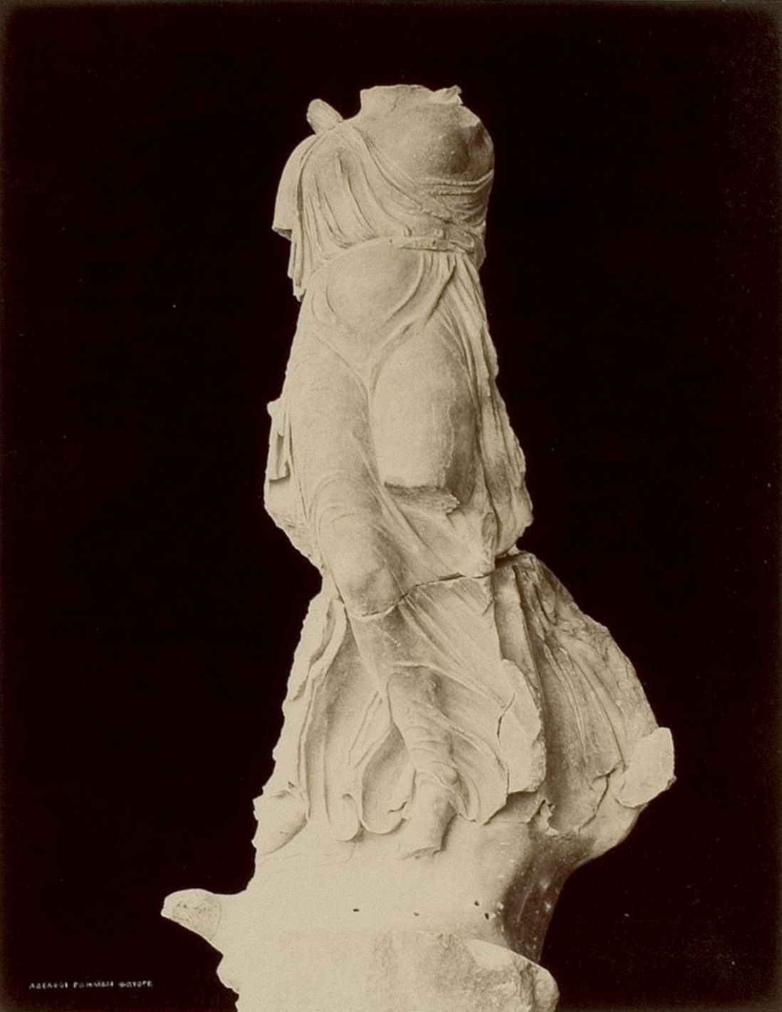 Nike des Paionios von Mende (Pausanias V. 26, 1) gefunden am 21.December 1875 an der auf dem Situationsplane mit a. bezeichneten Stelle, vor der Südostecke des Tempels und über 3 M. unter dem jetzigen Boden; der obere Theil im Sande liegend, der untere als Bestandtheil einer Mauer, zu welcher auch der Inschriftblock des Paionios (s. Taf. VII) gehörte. Höhe von der Fußspitze bis zum Hälfe 1,74 M. Aus dem Felsen auf den sie herabschwebt, fliegt ein Vogel (Adler? Möve?) heraus. Von den acht dreieckigen Blöcken, welche die Haus bildeten und zusammen eine Höhe von 4,60 M. haben, tragen zwei eine umfangreiche Inschrift aus dem zweiten vorchristlichen Jahrhundert, eine Entscheidung über einen zwischen Messeniern und Lakedaimoniern streitigen Landstrich. S. Archaeol. Ztg. 1876. S. 178ff.